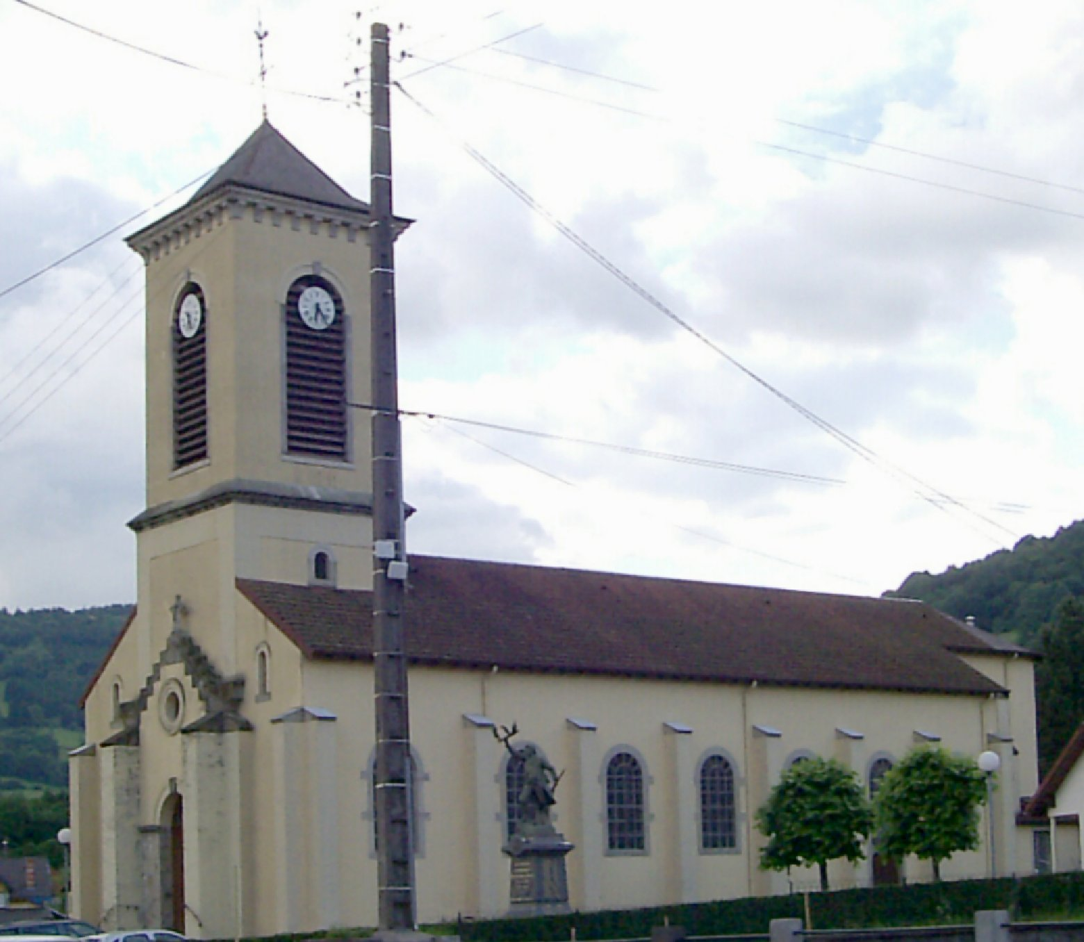 L'église Saint-Vincent-de-Paul à Ferdrupt